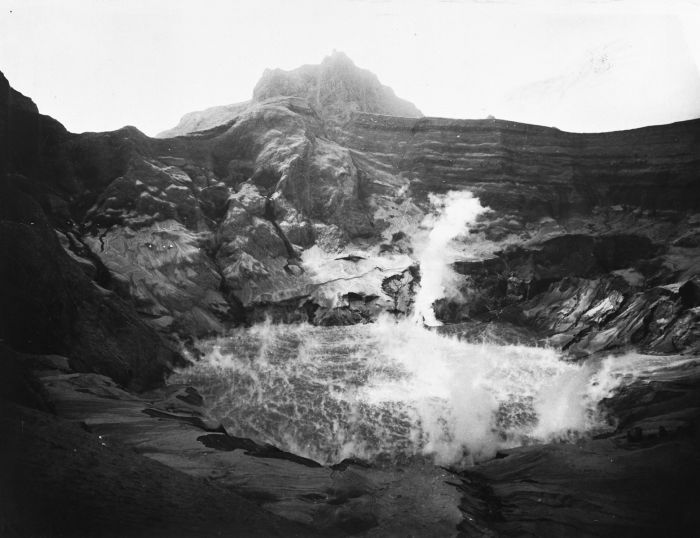 Foto. De krater van de vulkaan Goenoeng Keloed na de uitbarsting van 1901, Oost-Java.